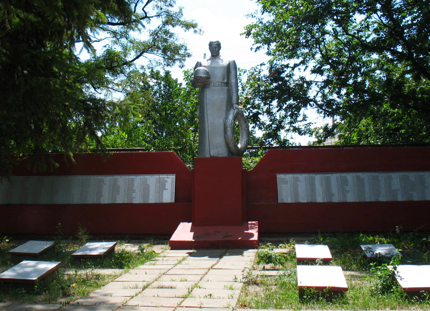 Памятник воинам ВОВ